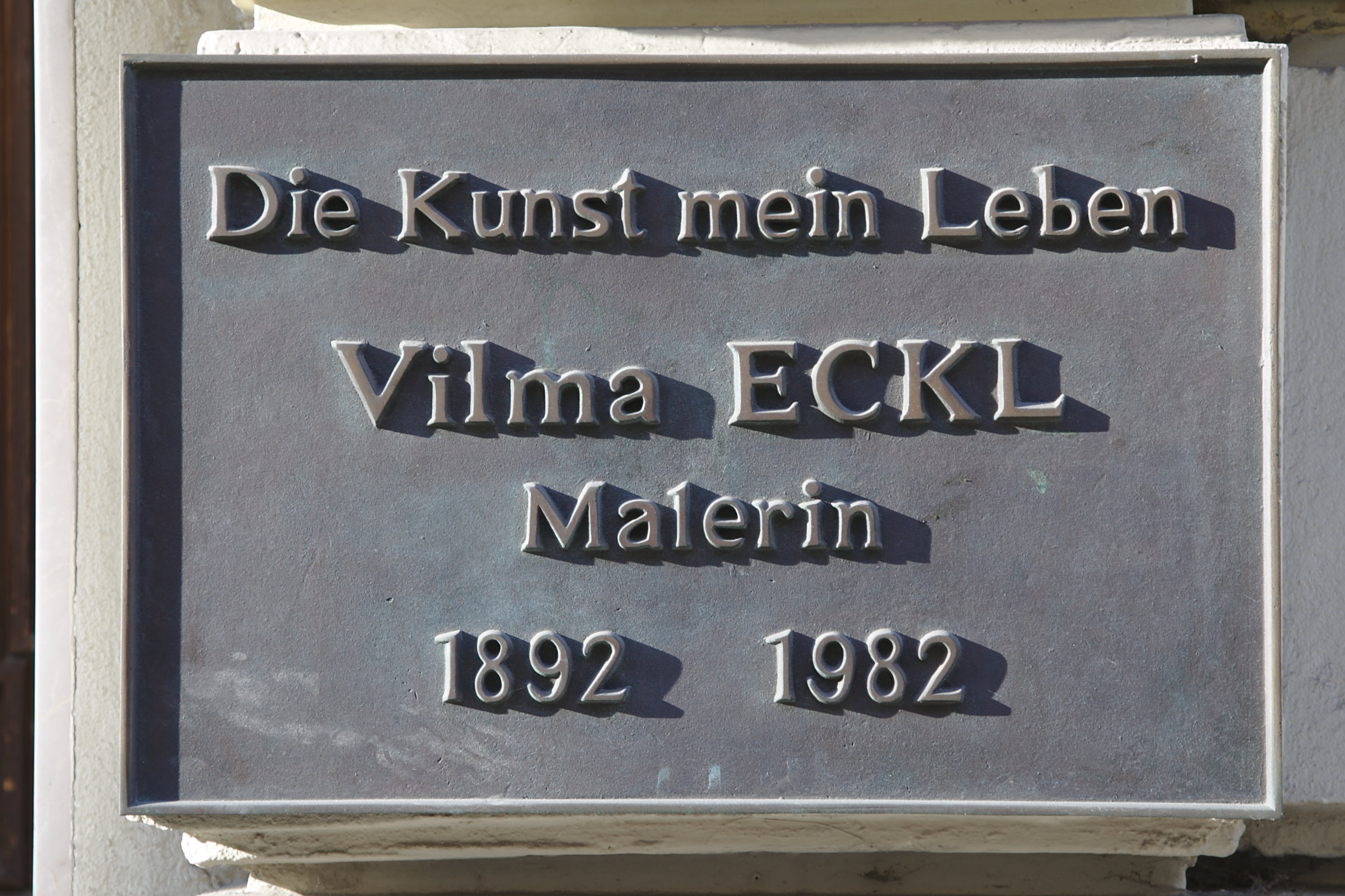 Vilma Eckl, Malerin